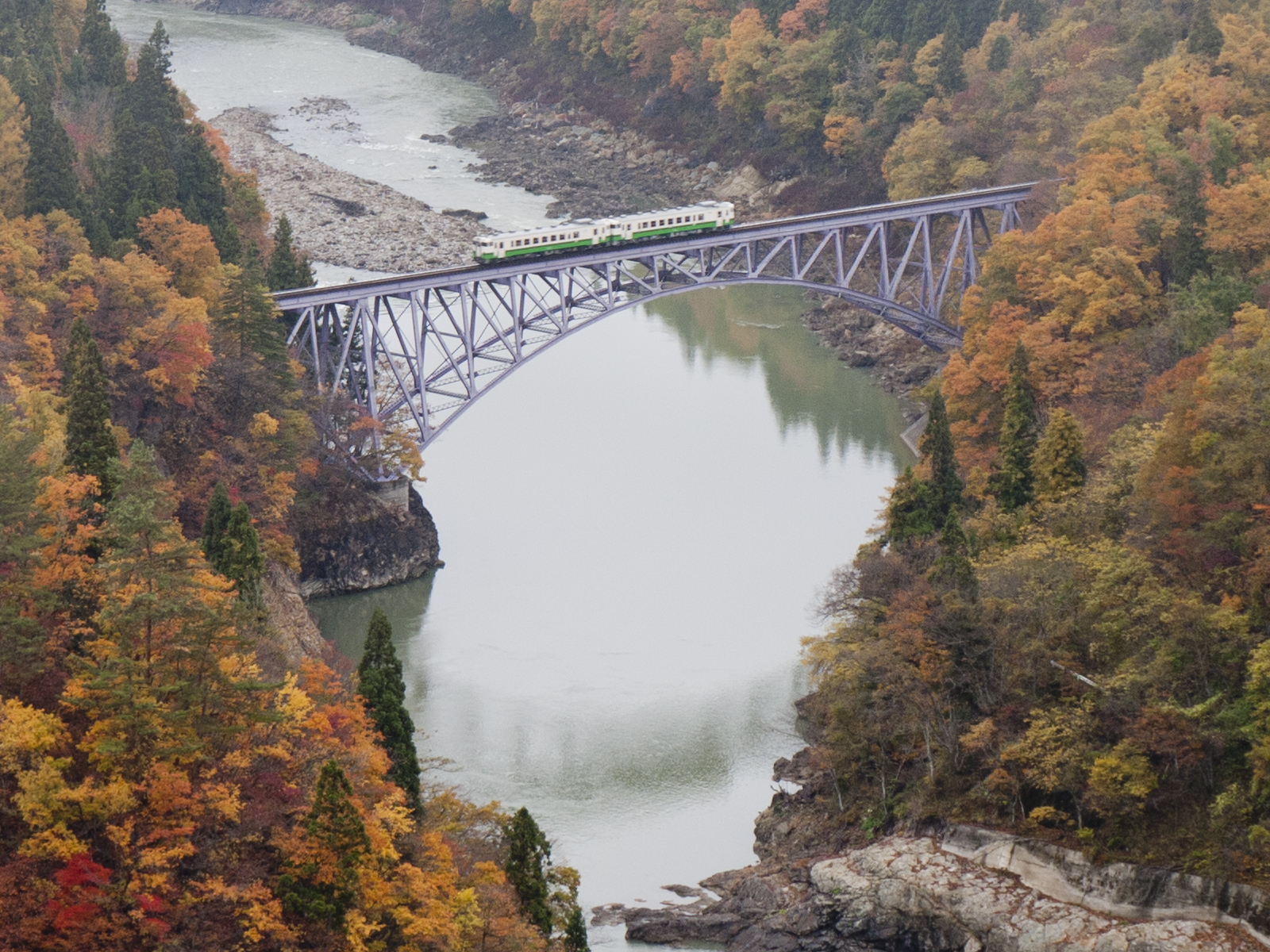 第一只見川橋梁